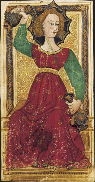 Charles VI (or Gringonneur) Deck; Le tarot dit de Charles VI